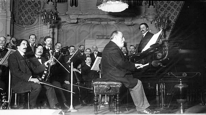 Audition de Camille Saint-Saëns à la salle Gaveau, Paris, 5 novembre 1913. Pianiste sur scène entouré de l'orchestre.